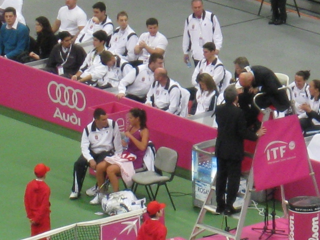 Ana Ivanović and Ai Sugiyama at Serbia vs. Japan Fed Cup tie